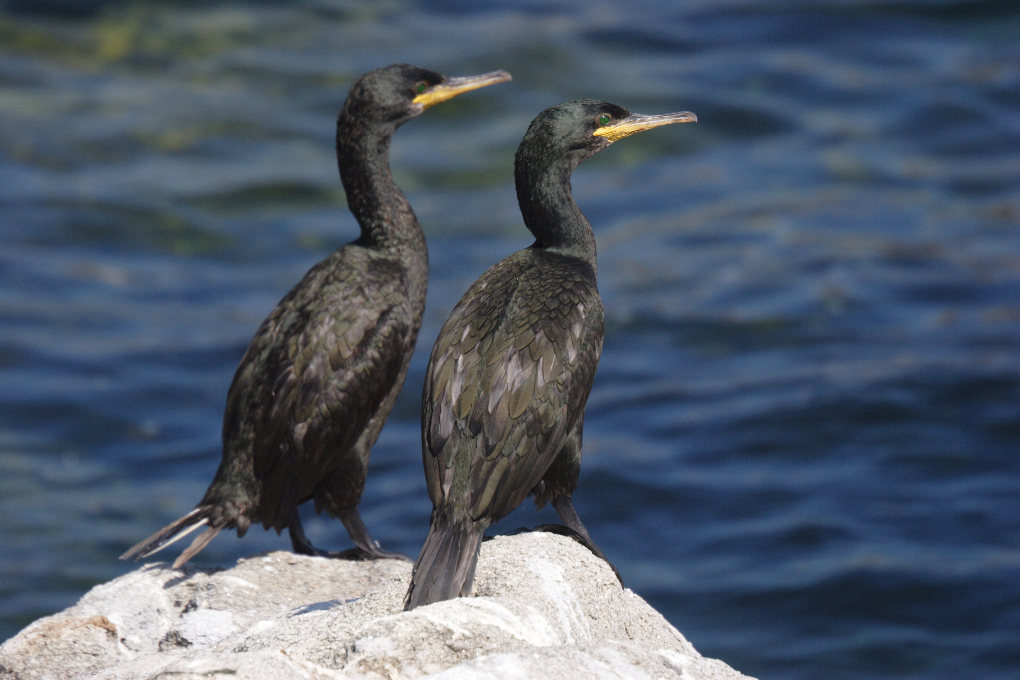 Cormoranes Moñudos en las Islas Cíes This is a photography of a Special Area of Conservation in Spain with the ID: ES0000001. Natura2000 entry, EEA entry